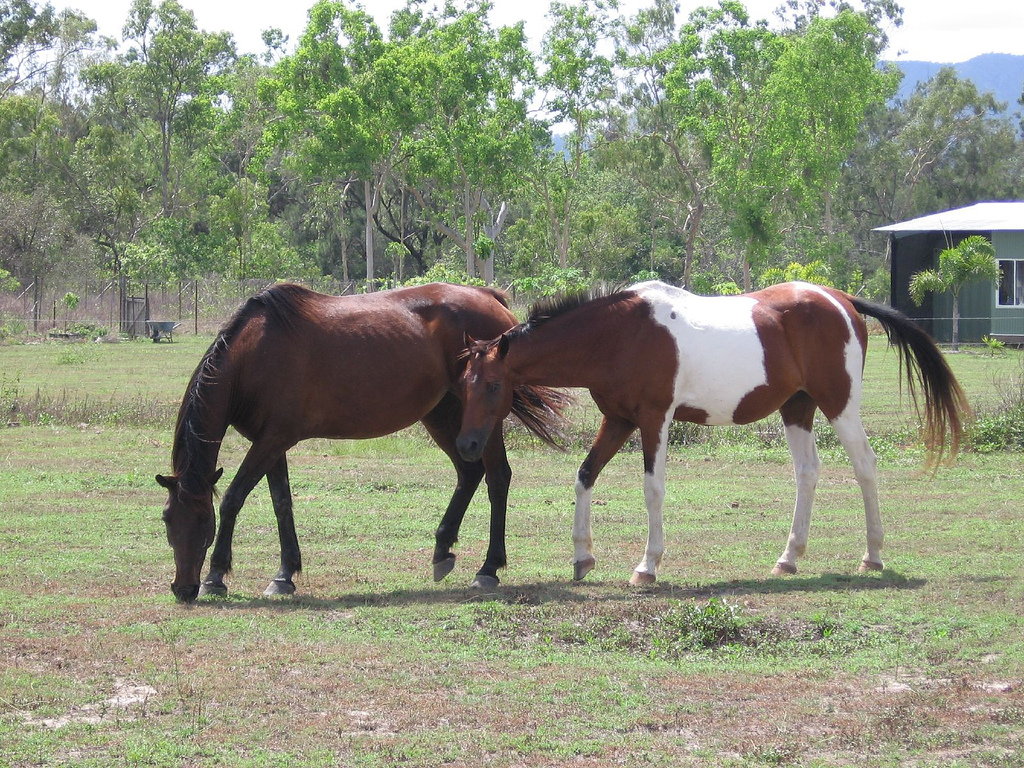 brumbys